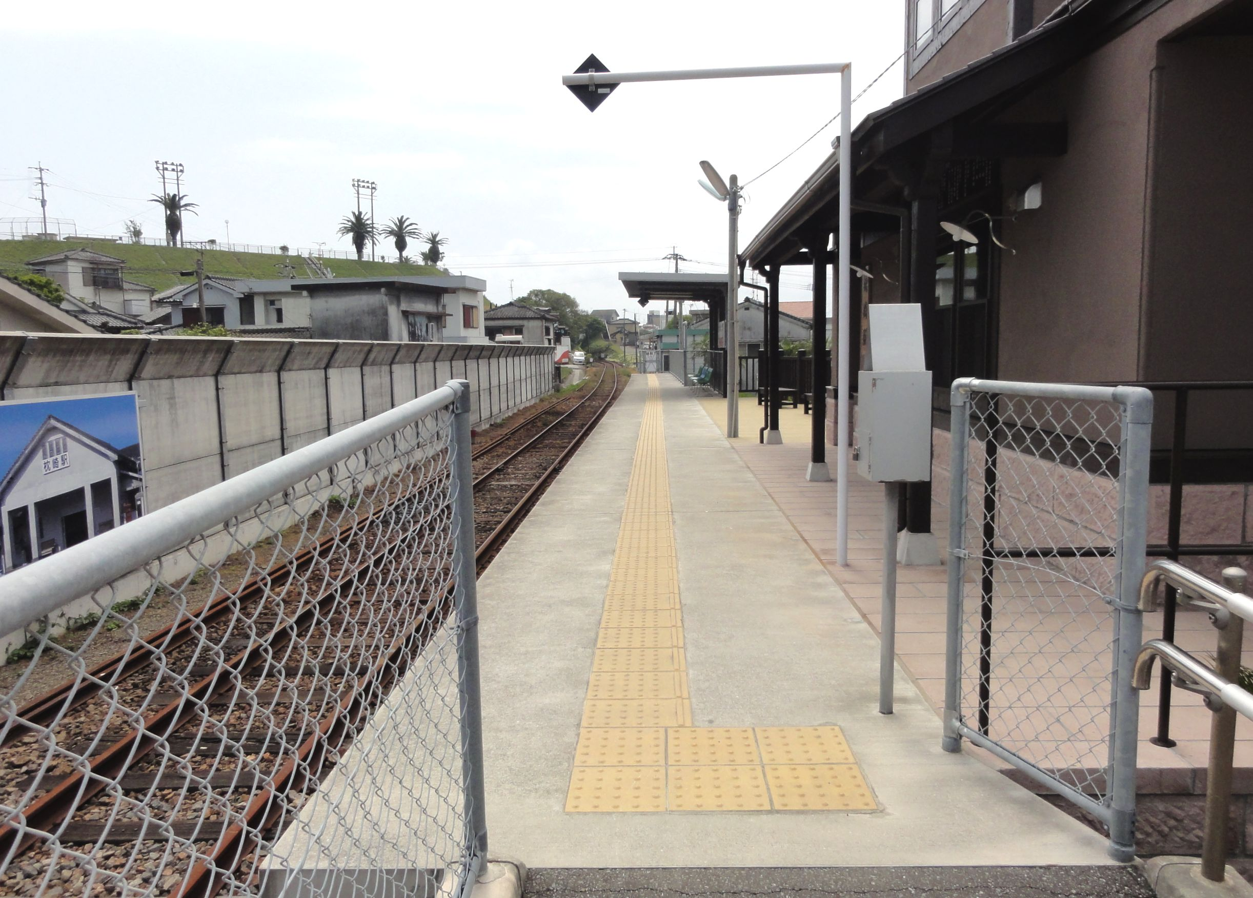 枕崎駅 駅舎とホーム（指宿駅方面）